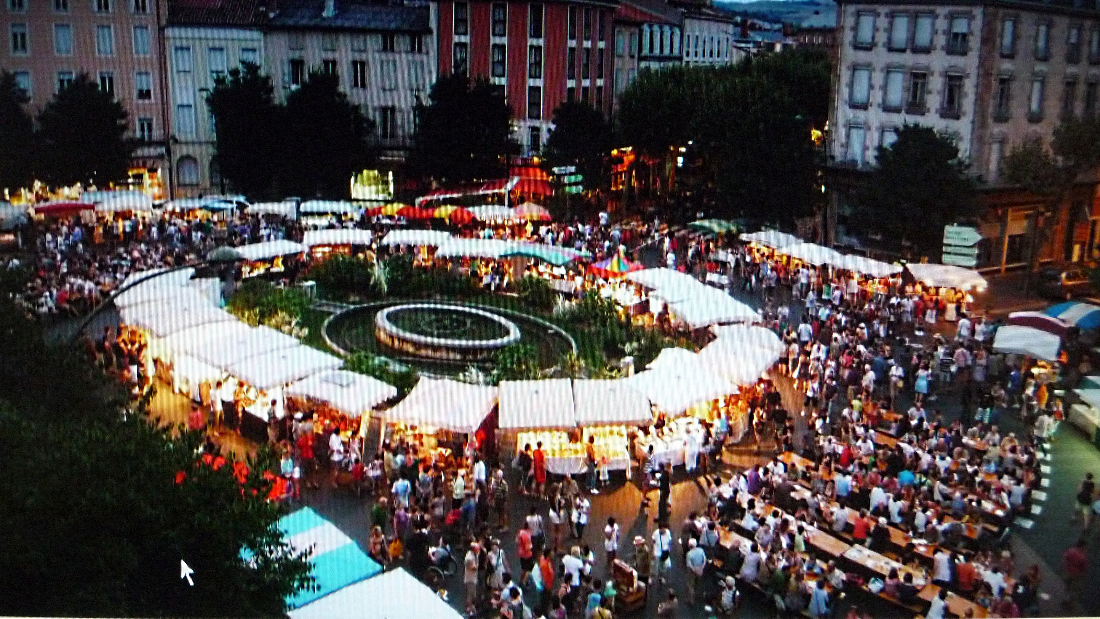 Vue générale du marché des agriculteurs-producteurs de l'association "Fermiers de l'Aveyron", place du Mandarous à Millau dans l'Aveyron. La fréquentation était moyenne ce lundi là.